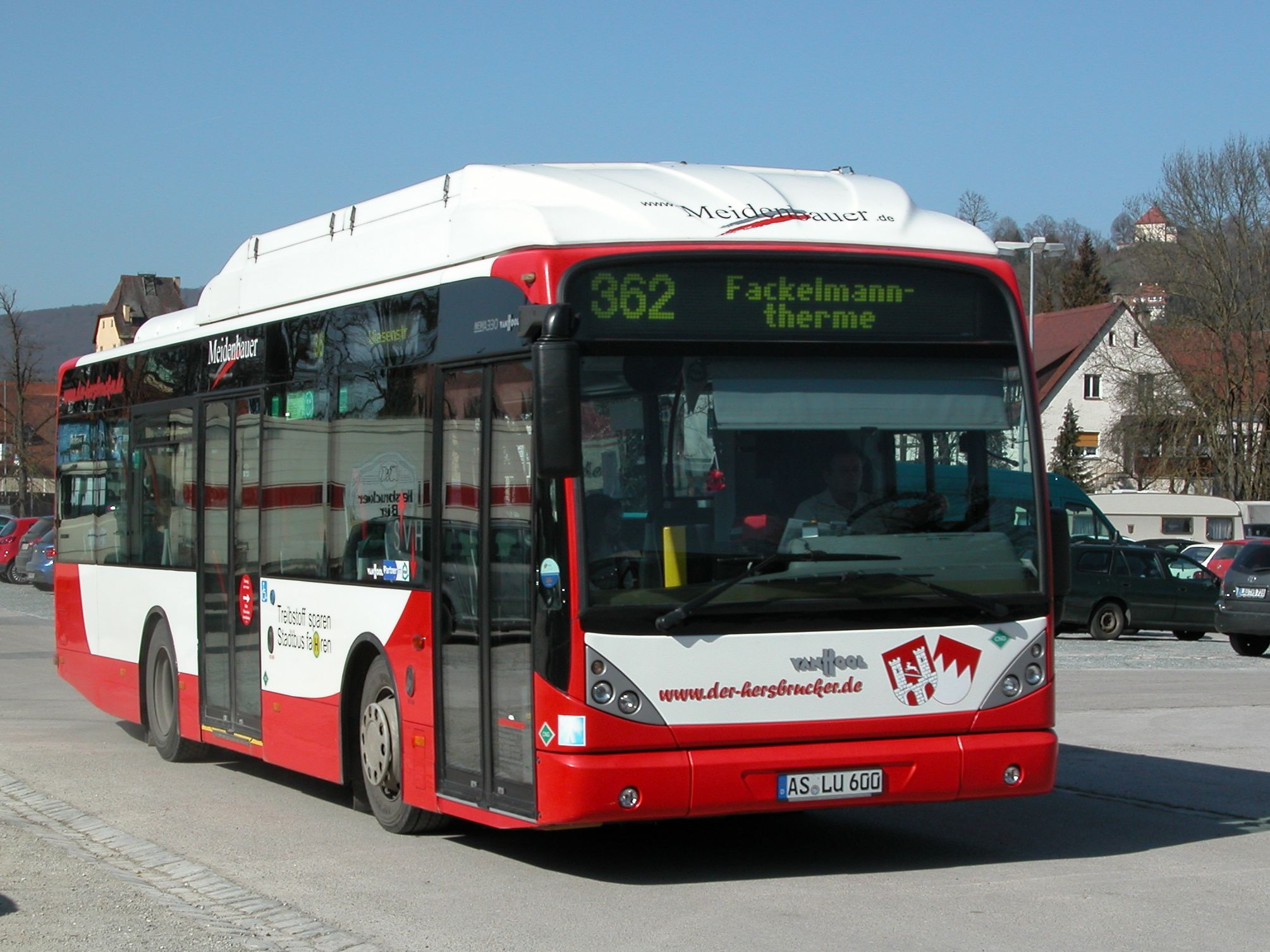 Meidenbauer_LU_600